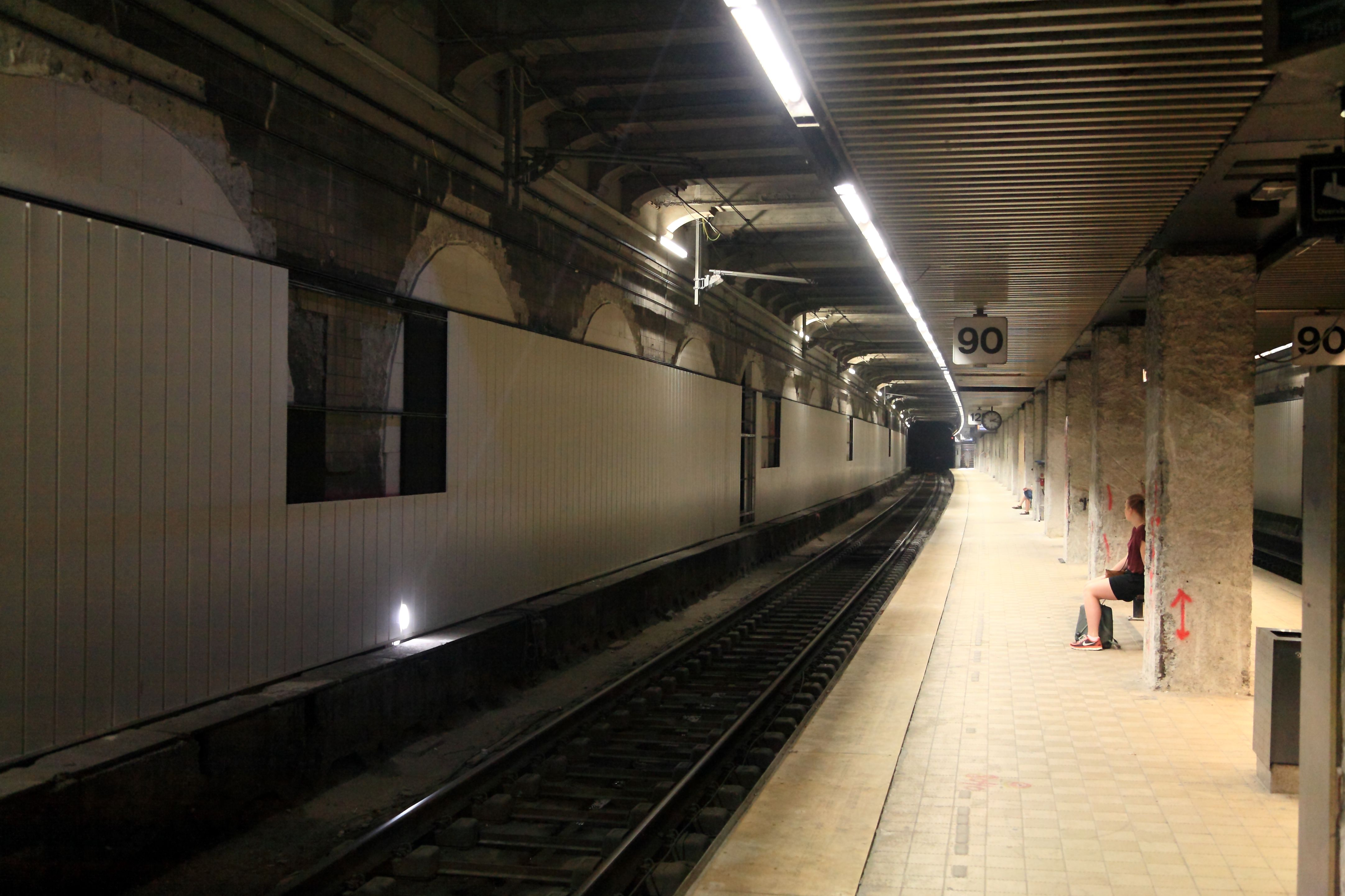 Fernbahnsteig Richtung Süden